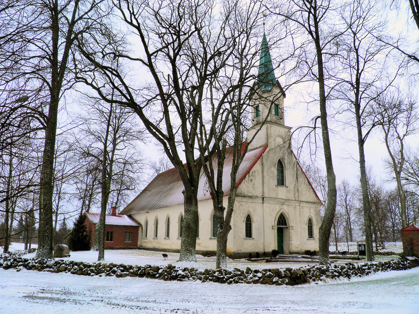 Salacgrīvas luterāņu baznīca